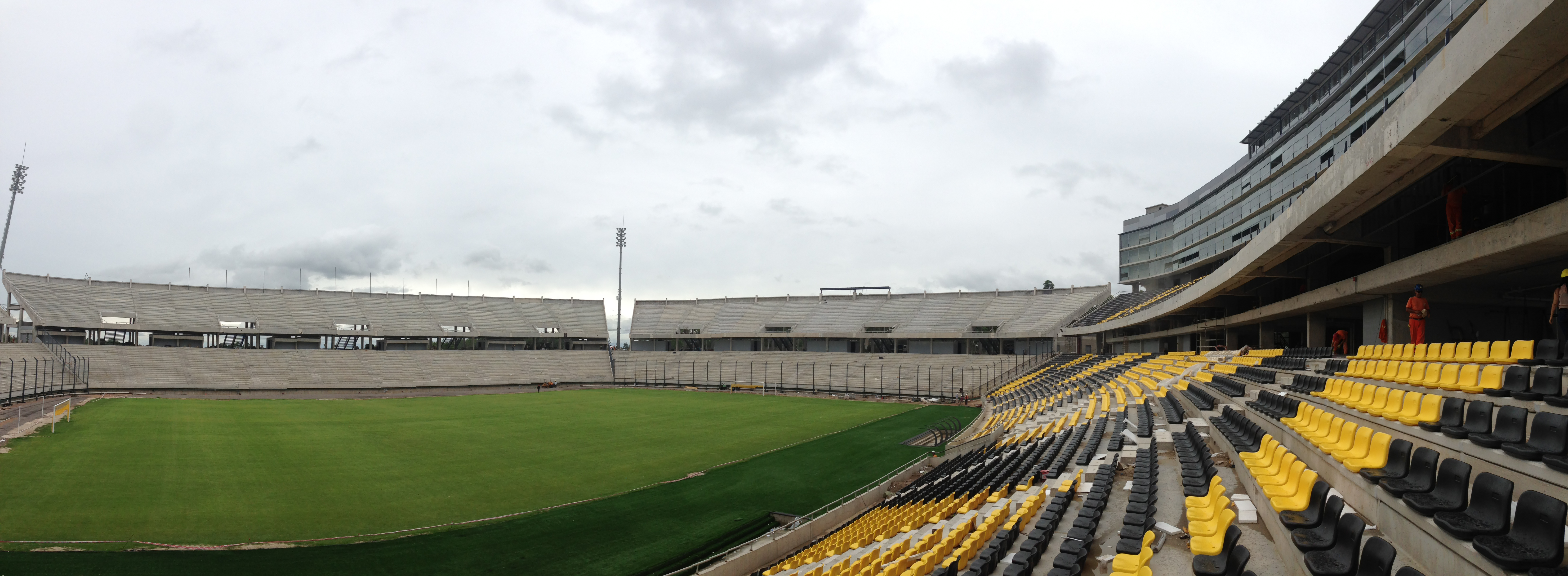 Estadio del Club Atlético Peñarol. Arquitecto Luis Rodríguez Tellado. Ubicación Ruta 102 (Ruta Nacional Perimetral Wilson Ferreira), Camino Manganga y Camino de los Siete Cerros, Montevideo, Uruguay. A la derecha de la imagen se observa la tribuna Oficial (tribuna norte) los palcos y las cabinas de prensa